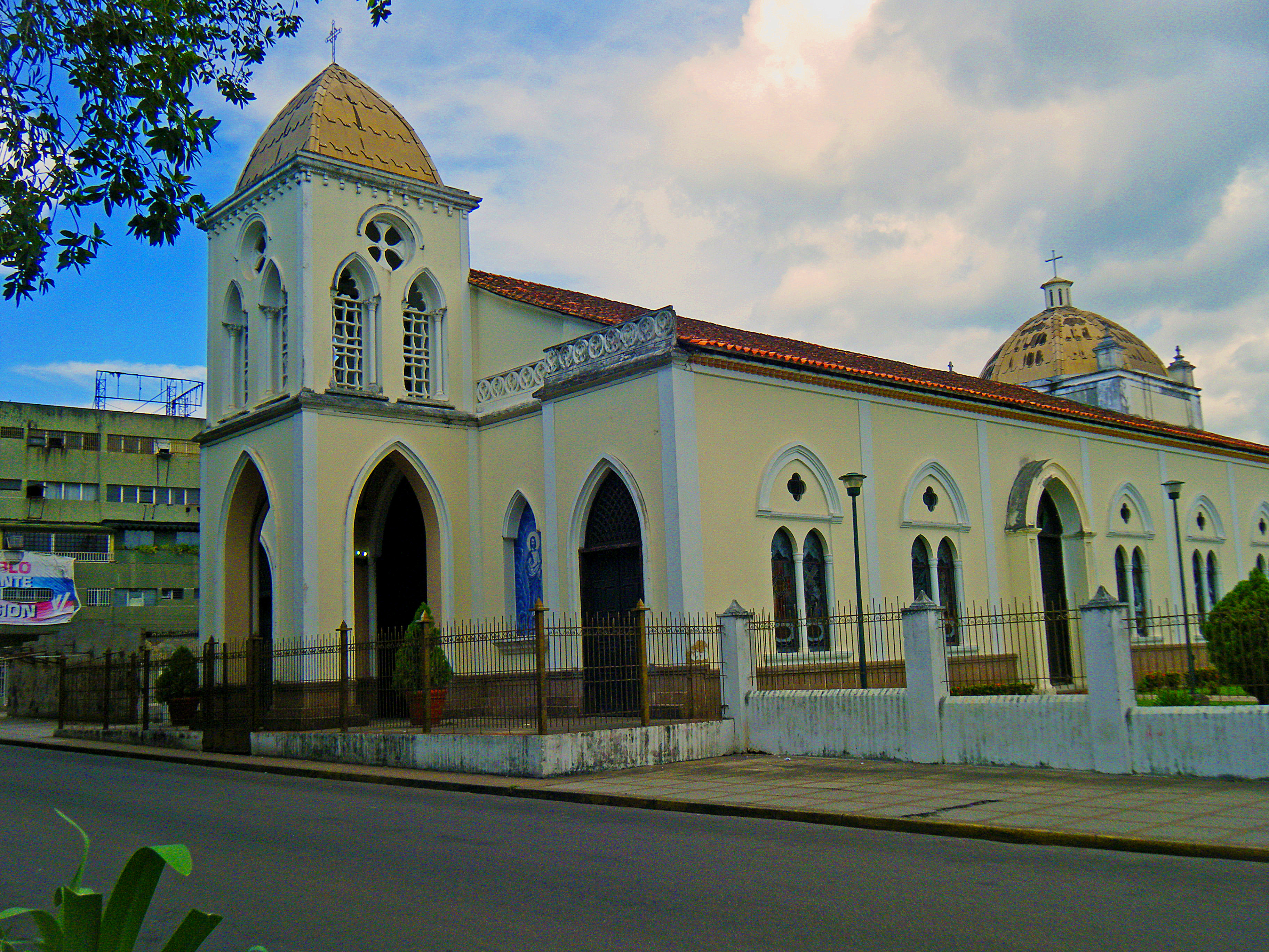 Iglesia de San Simón en Maturín, Estado Monagas, Venezuela.